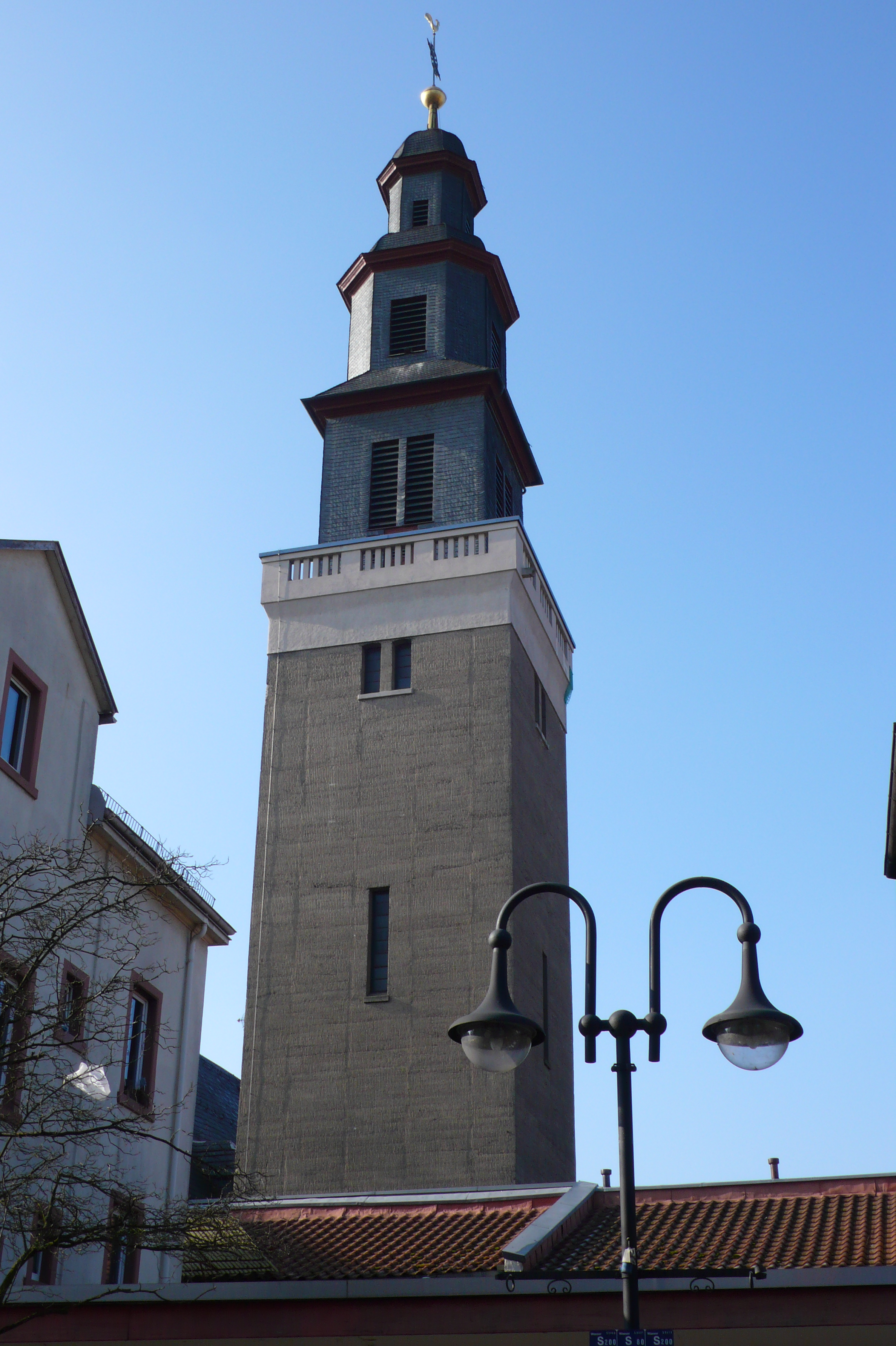 Evangelische Melanchthonkirche in Frankfurt-Fechenheim, barocke Kirche von 1772, Turm aus Stahlbeton